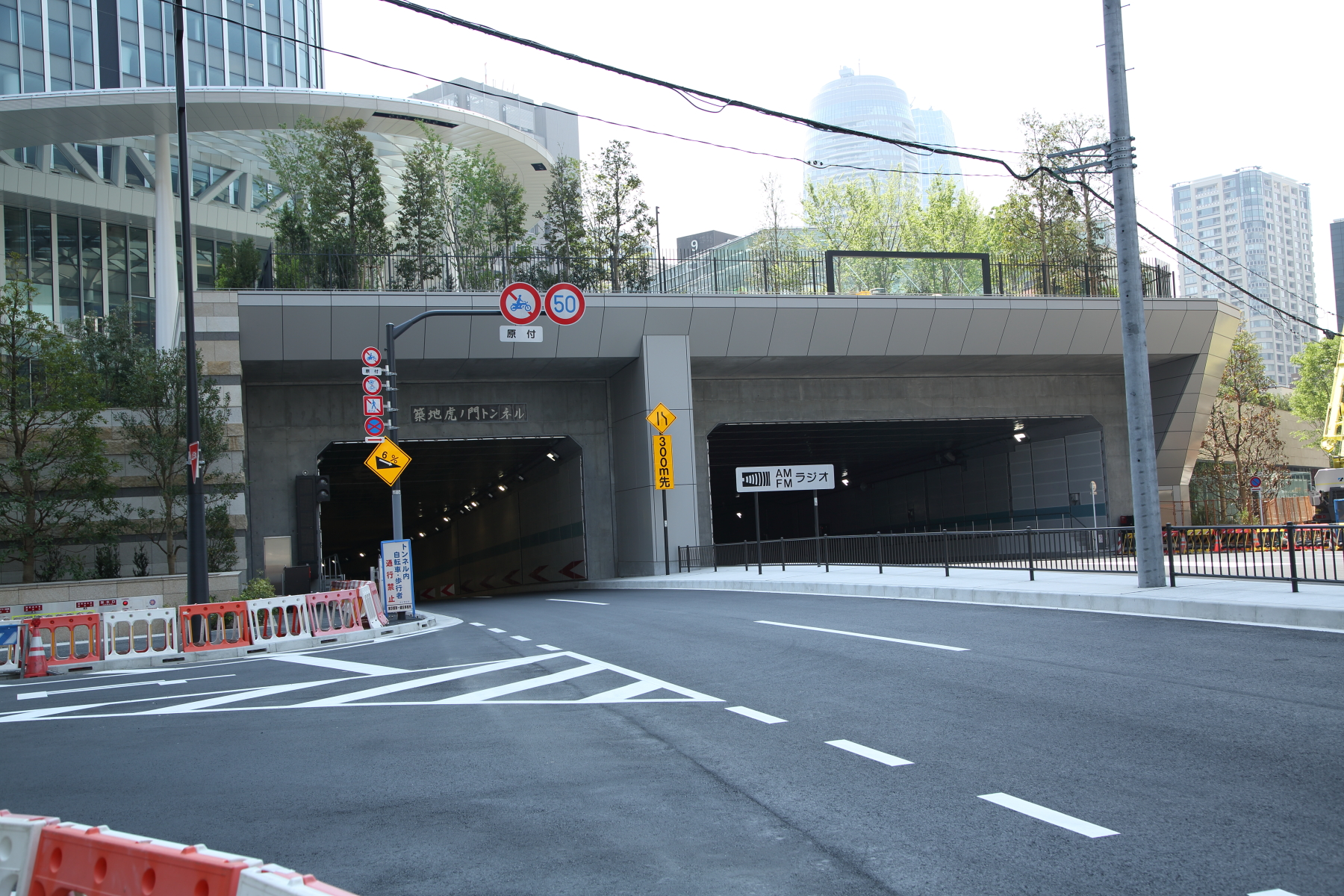 日本の東京都港区にある、築地虎ノ門トンネル（虎ノ門側出口）。東京都市計画道路幹線街路環状第2号線。